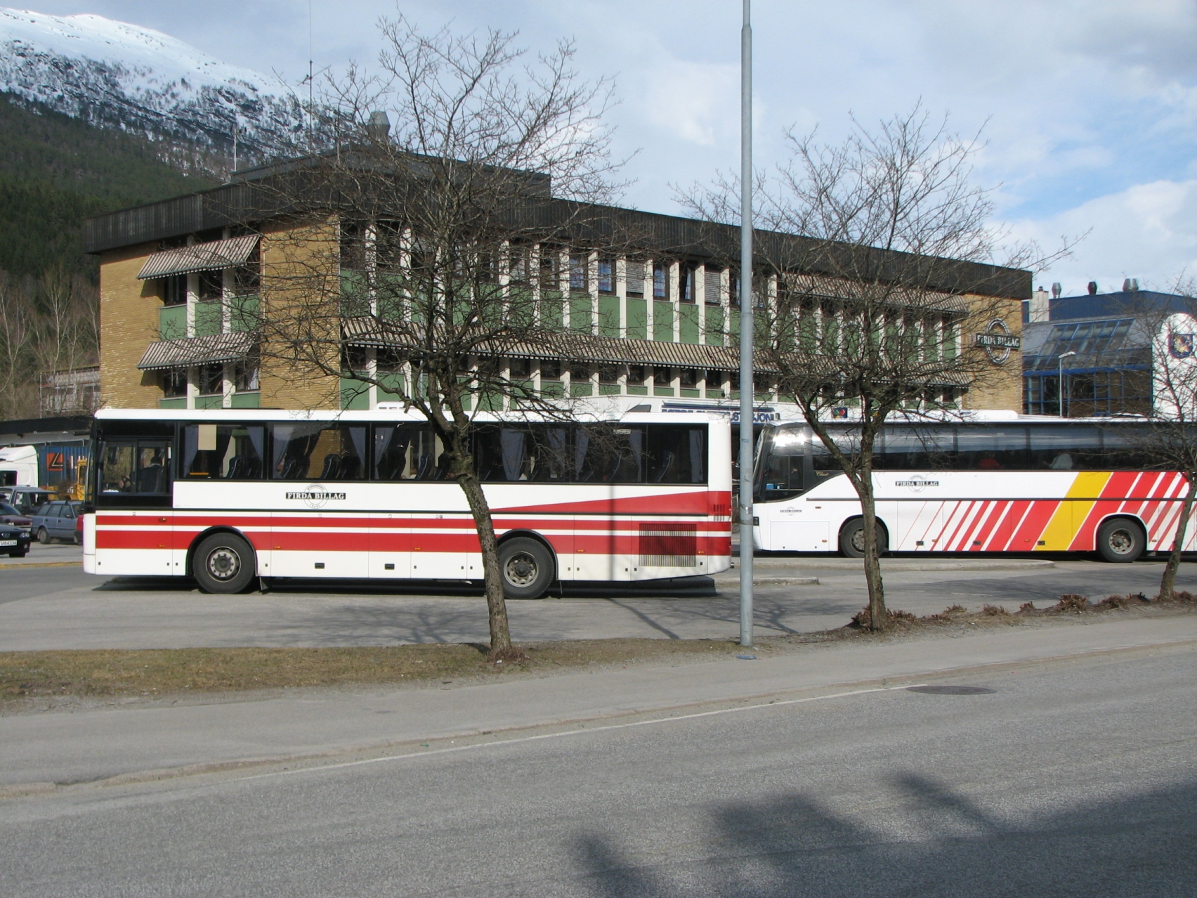 Rutebilstasjonen Førde.